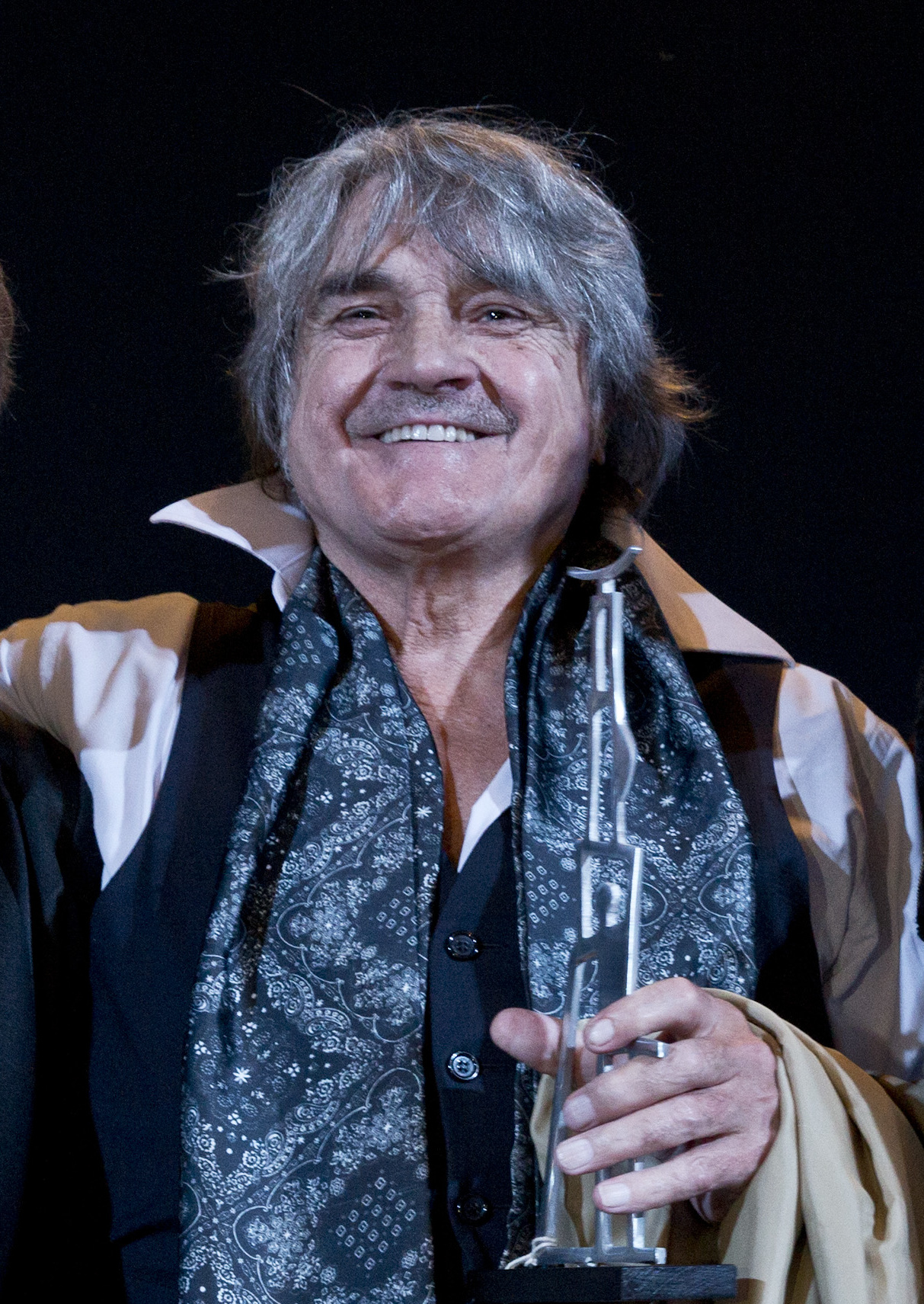 Buenos aires, 1 de mayo de 2015.- La ministra de Cultura de la Nación, Teresa Parodi, participó junto a Angela Signes, titular de la Comisión Nacional de Bibliotecas Populares (Conabip), del acto de bienvenida a los bibliotecarios y voluntarios del organismo en la 41ª Feria Internacional del Libro en Buenos Aires. En el acto también se entregó el Premio Amigo de las Bibliotecas Populares, que con motivo de los diez años del programa Libro %, este año distinguió a Lito Cruz, Miguel Rep, Claudia Piñeiro, Juan Diego Incardona, Lola Berthet y Tom Lupo por su constante colaboración con la Conapib. Foto: Augusto Starita / Ministerio de Cultura de la Nación.